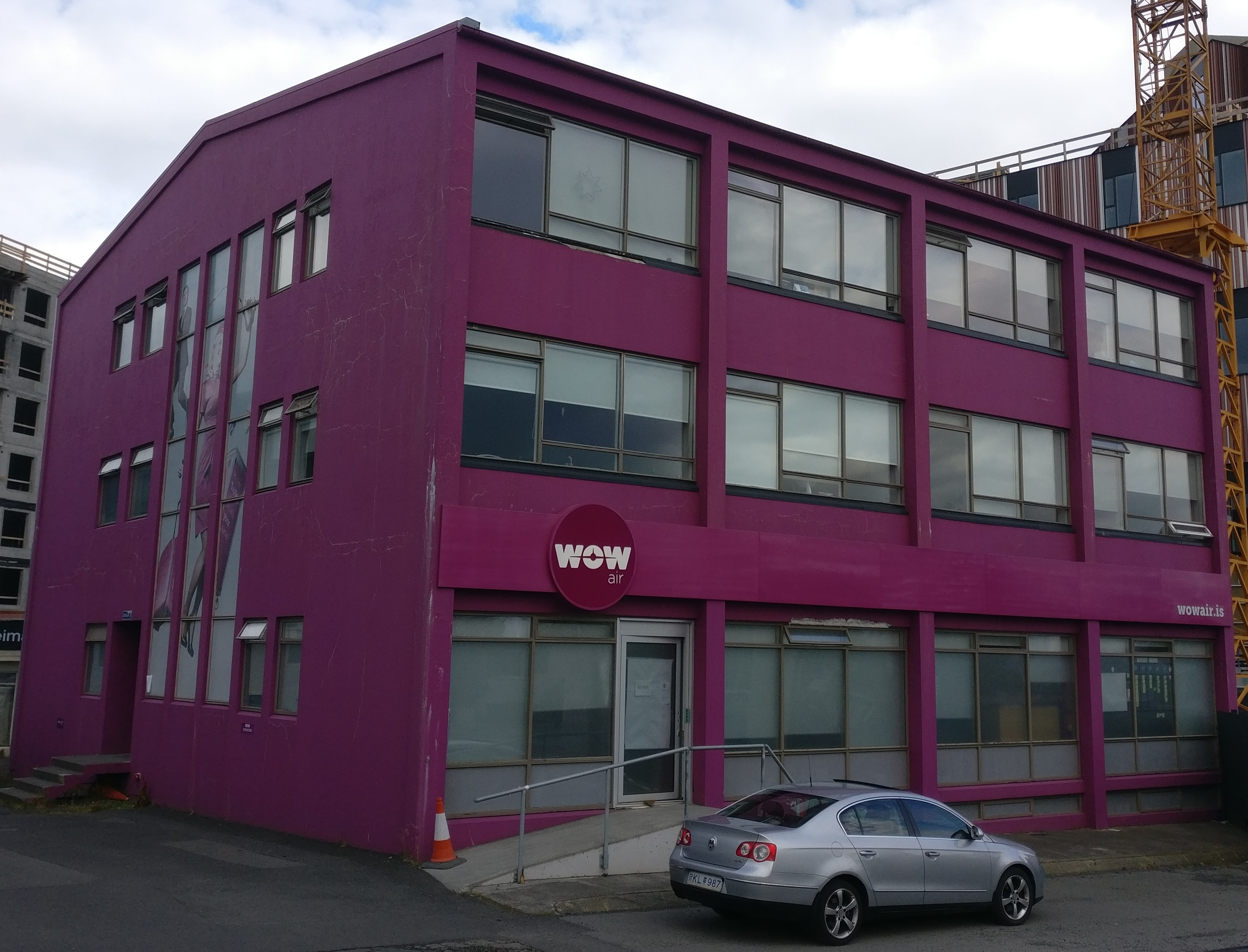 Bríetartún 13 - 105 Reykjavik